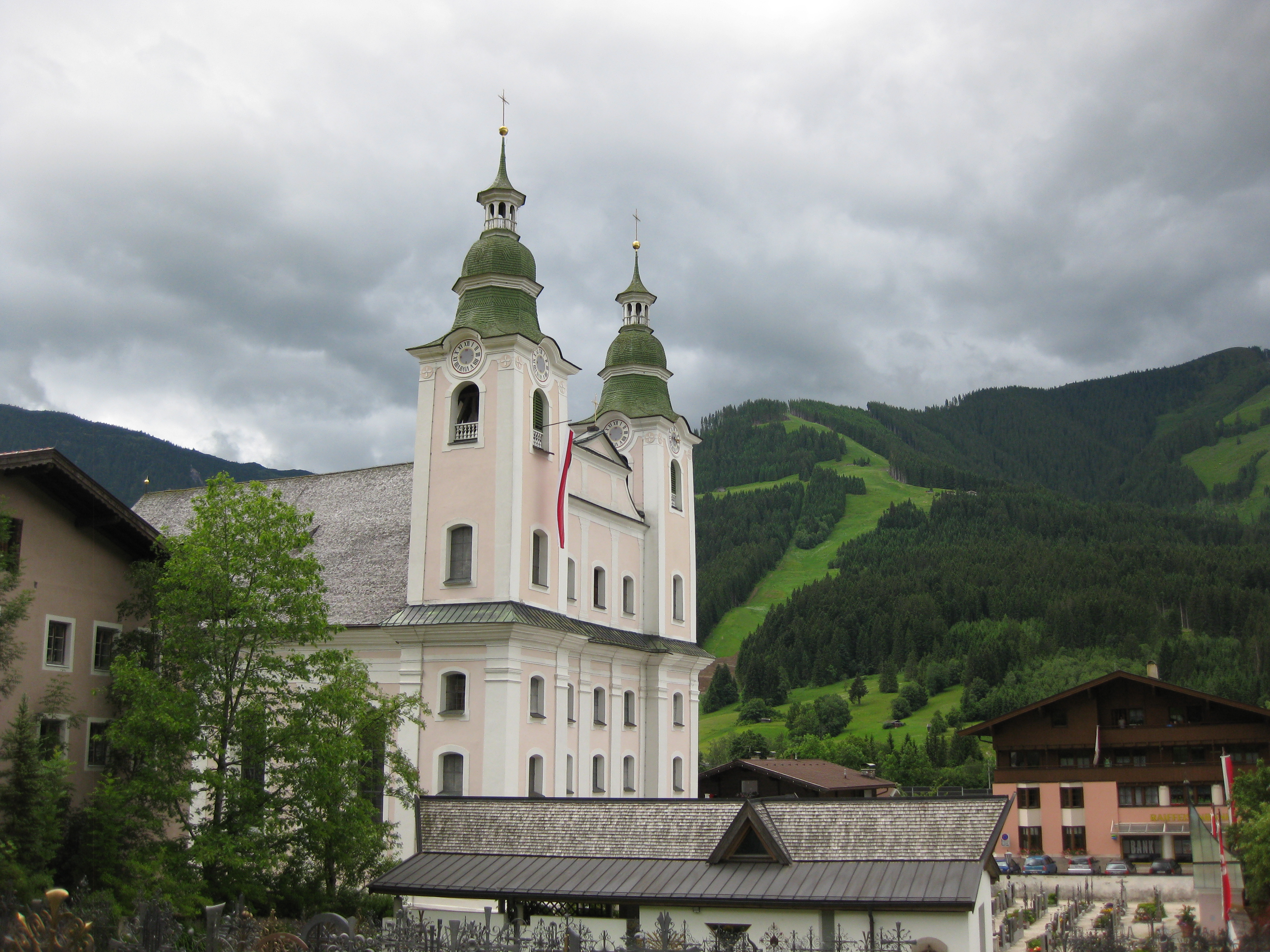 Dekanatspfarrkirche Brixen im Thale